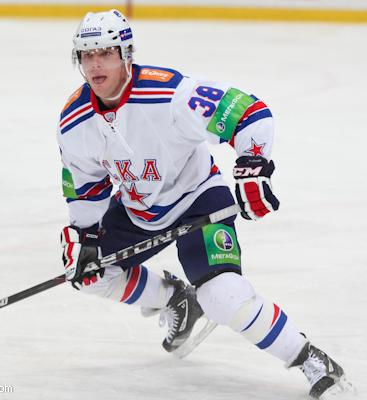 Защитник СКА Кевин Даллмэн во время матча чемпионата КХЛ против новокузнецкого «Металлурга» 19 декабря 2012 года.